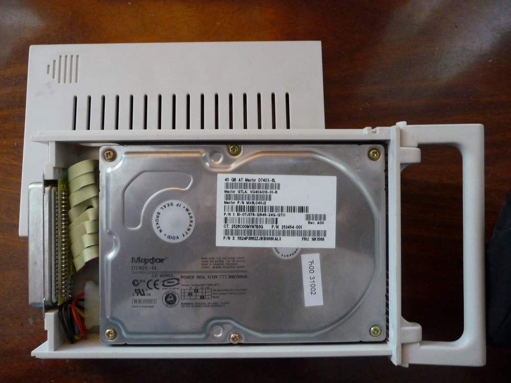 Выдвижной картридж Mobile Rack с диском Maxtor (крышка снята)